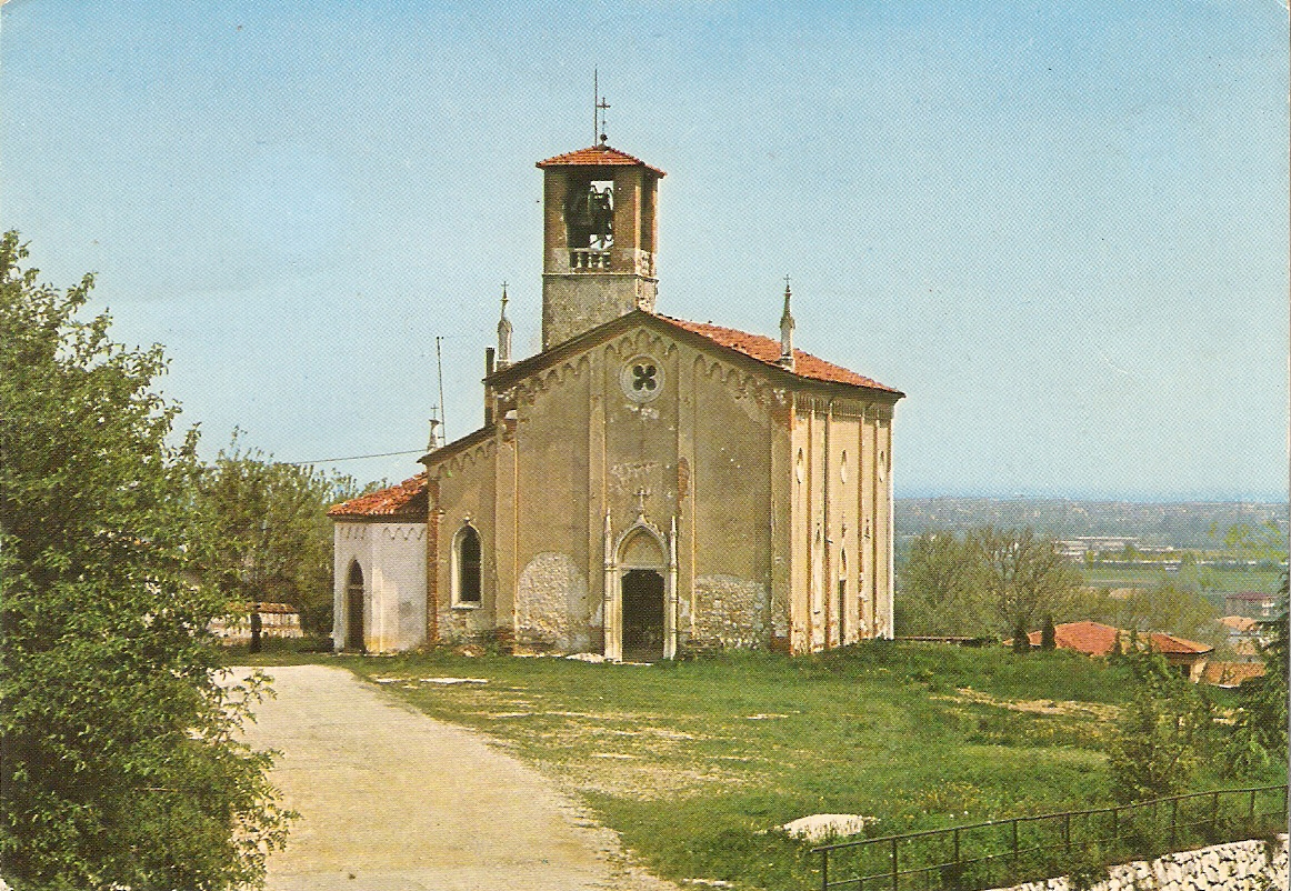 Foto degli anni 70 della chiesa longobarda di San Giorgio a Costabissara, Vicenza.